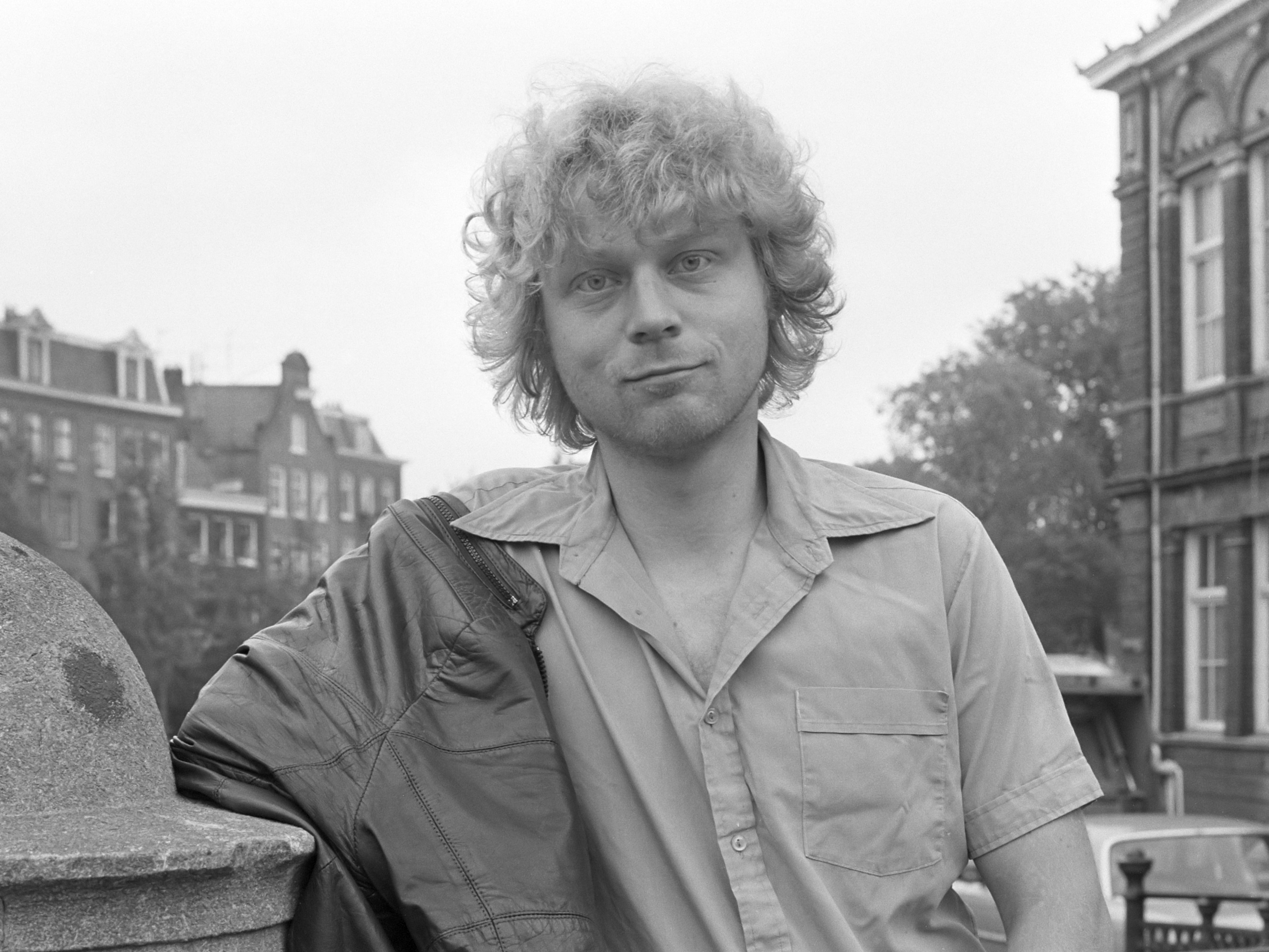 Opdracht UN/GPD 18 september 1984